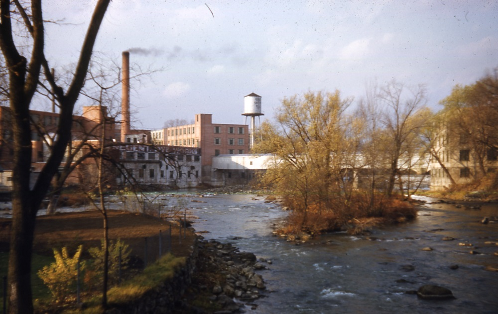 Diapositive couleur illustrant la municipalité de Saint-Jérôme en automne dans la région administrative des Laurentides.